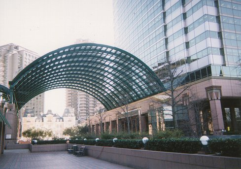 Ebisu Garden Place